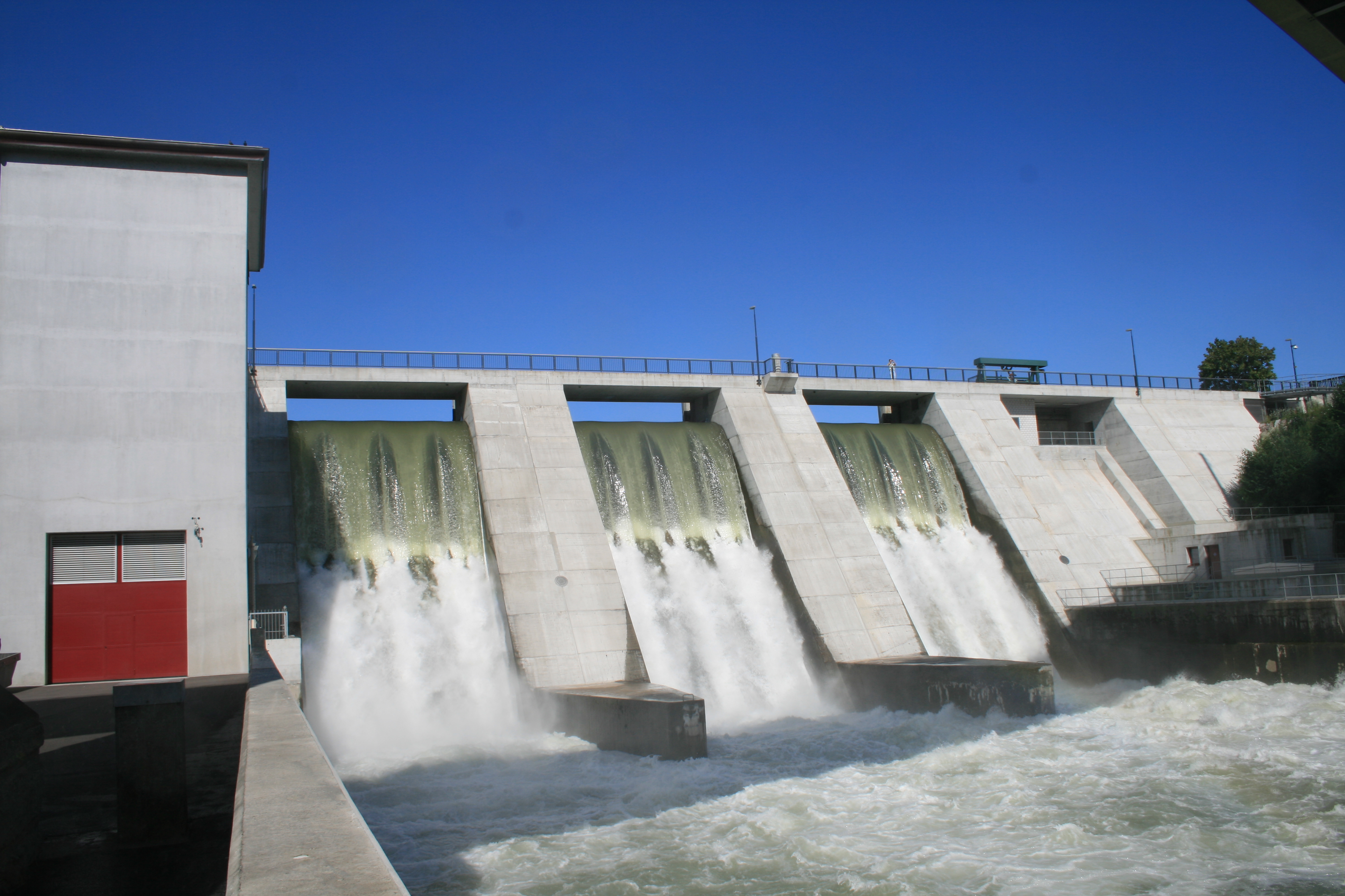 Staumauer Wettingen, Schweiz